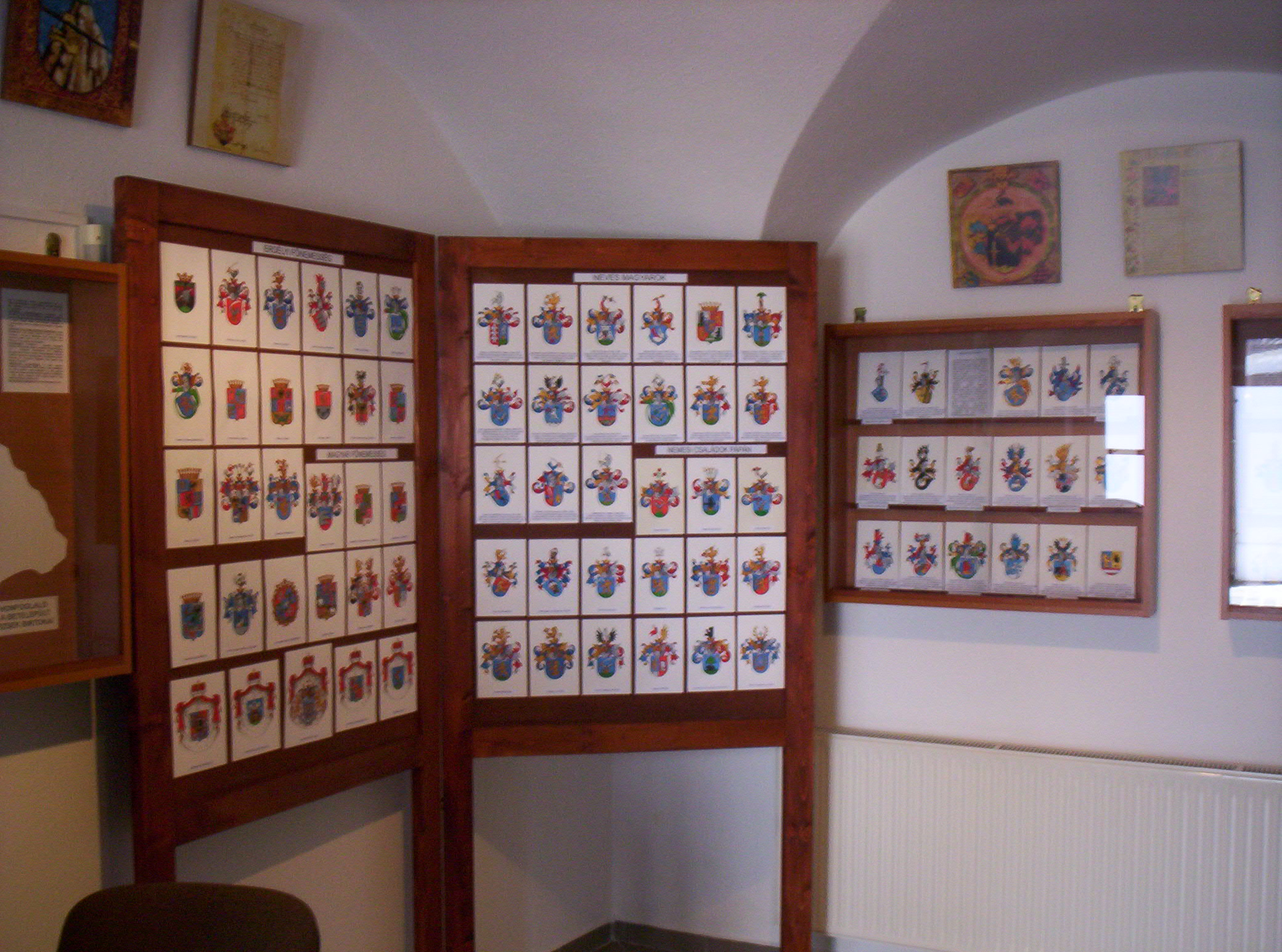 Exhibition of the Coat of Arms Museum in Pápa, HungaryA pápai címermúzeum kiállítása, Pápa, Fő tér 23.